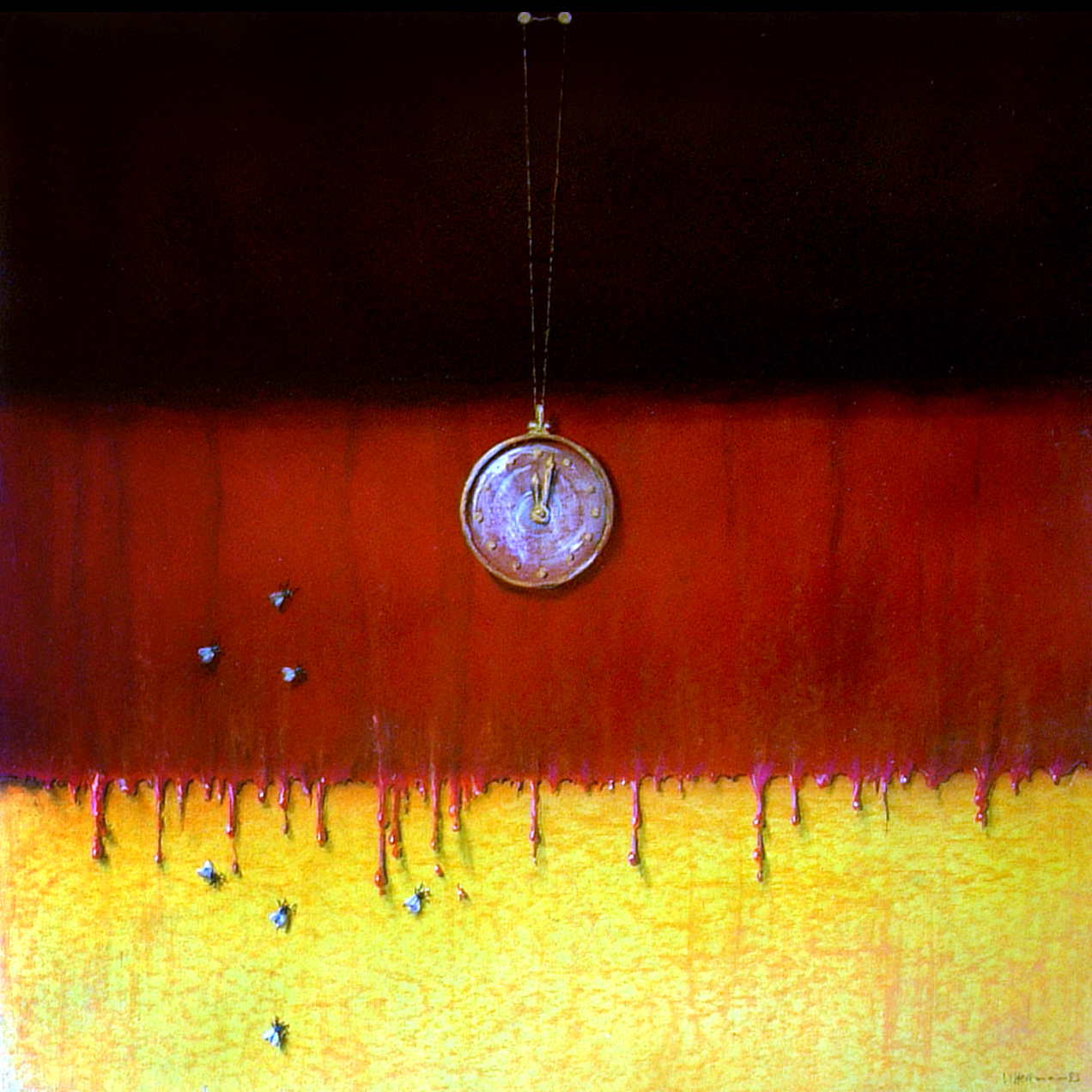 Zeit der Fliegen Walter Heckmann1983 60cm x 60cm Acrylic/Tempera/Paste l© Copyrighted work